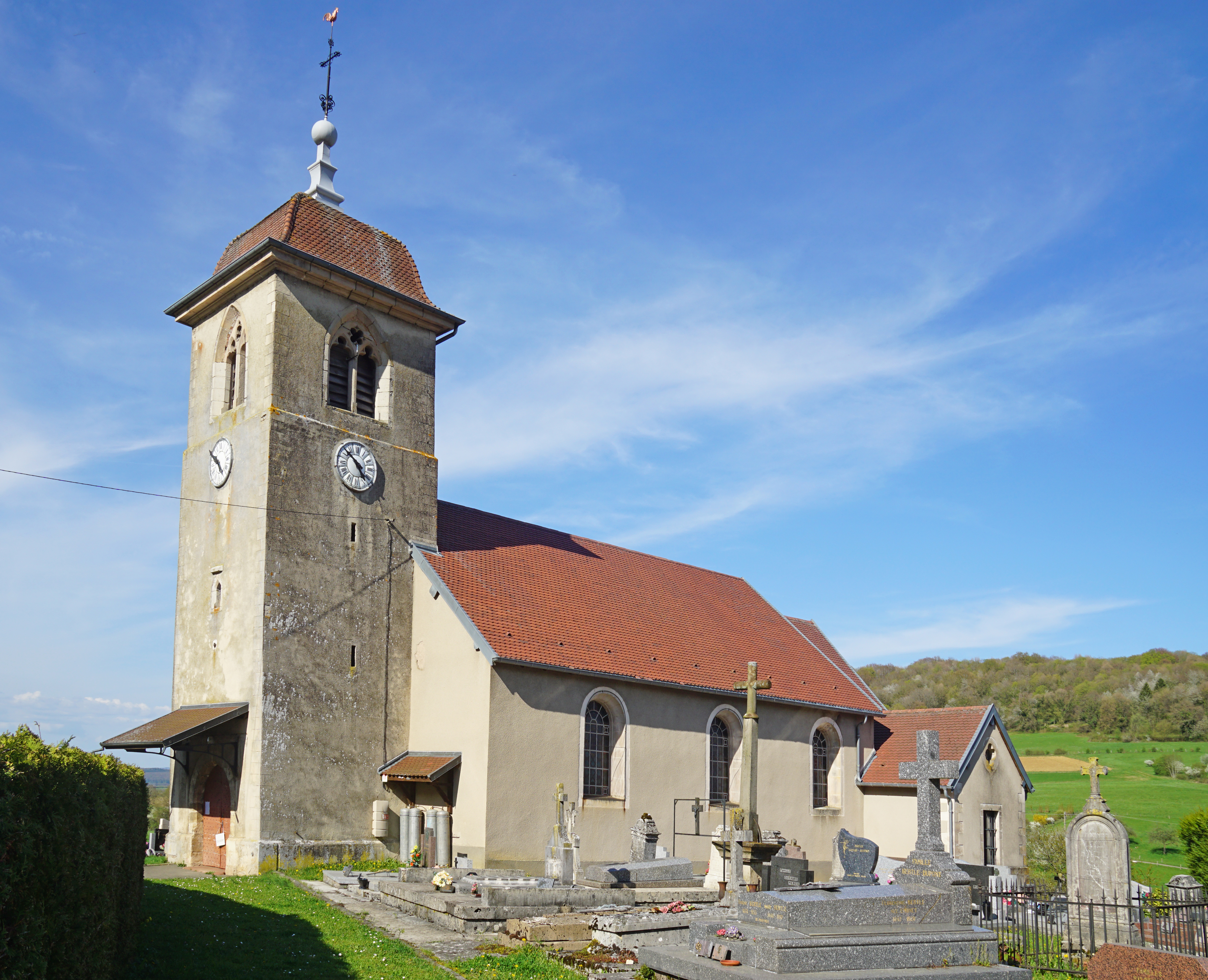 L'église de la Nativité de Notre-Dame de Marvelise (25).